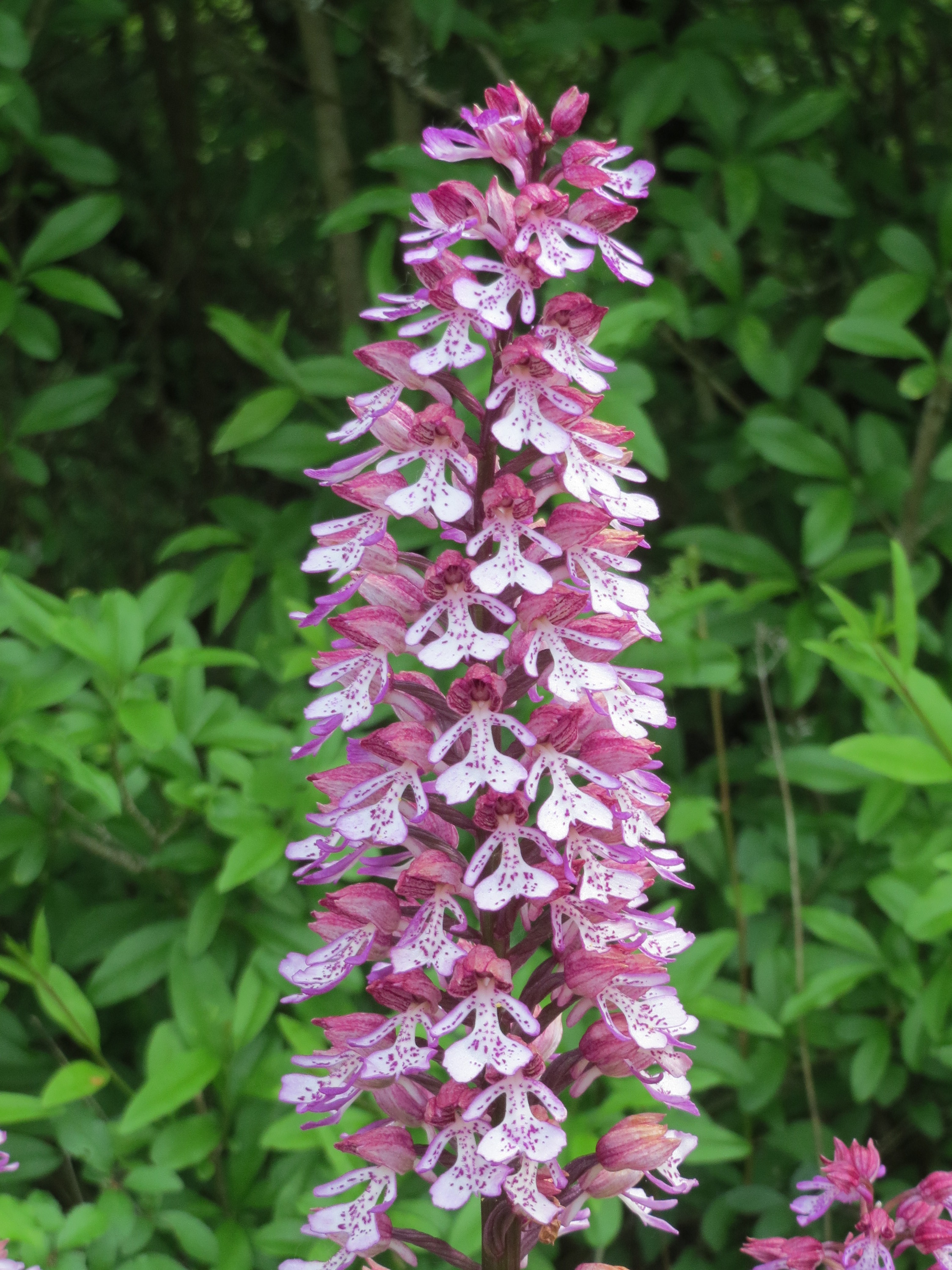 Hybrid-Knabenkraut (Orchis × hybrida) im Naturschutzgebiet Badstube